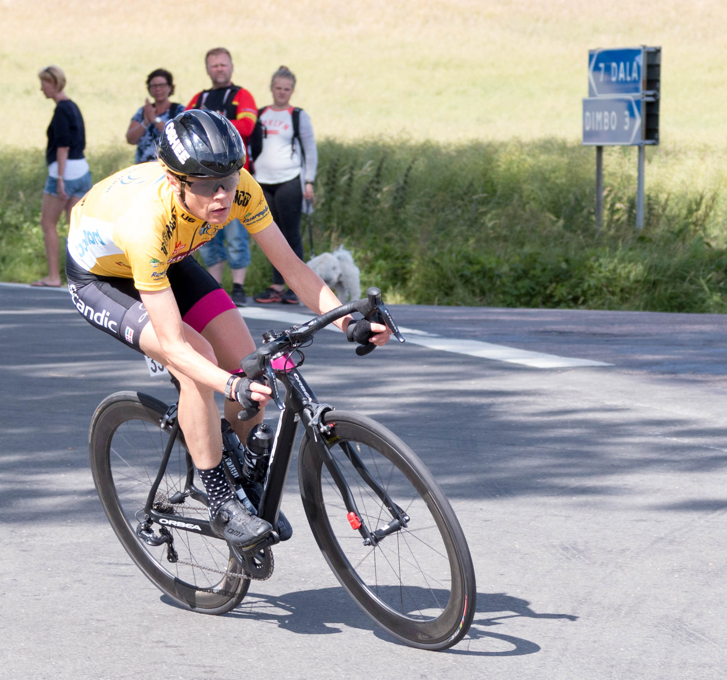 Louise Holm Houbak i gul ledartröja passerar Granne Påle på etapp 5 av 6 på U6 Cycle Tour 2017.